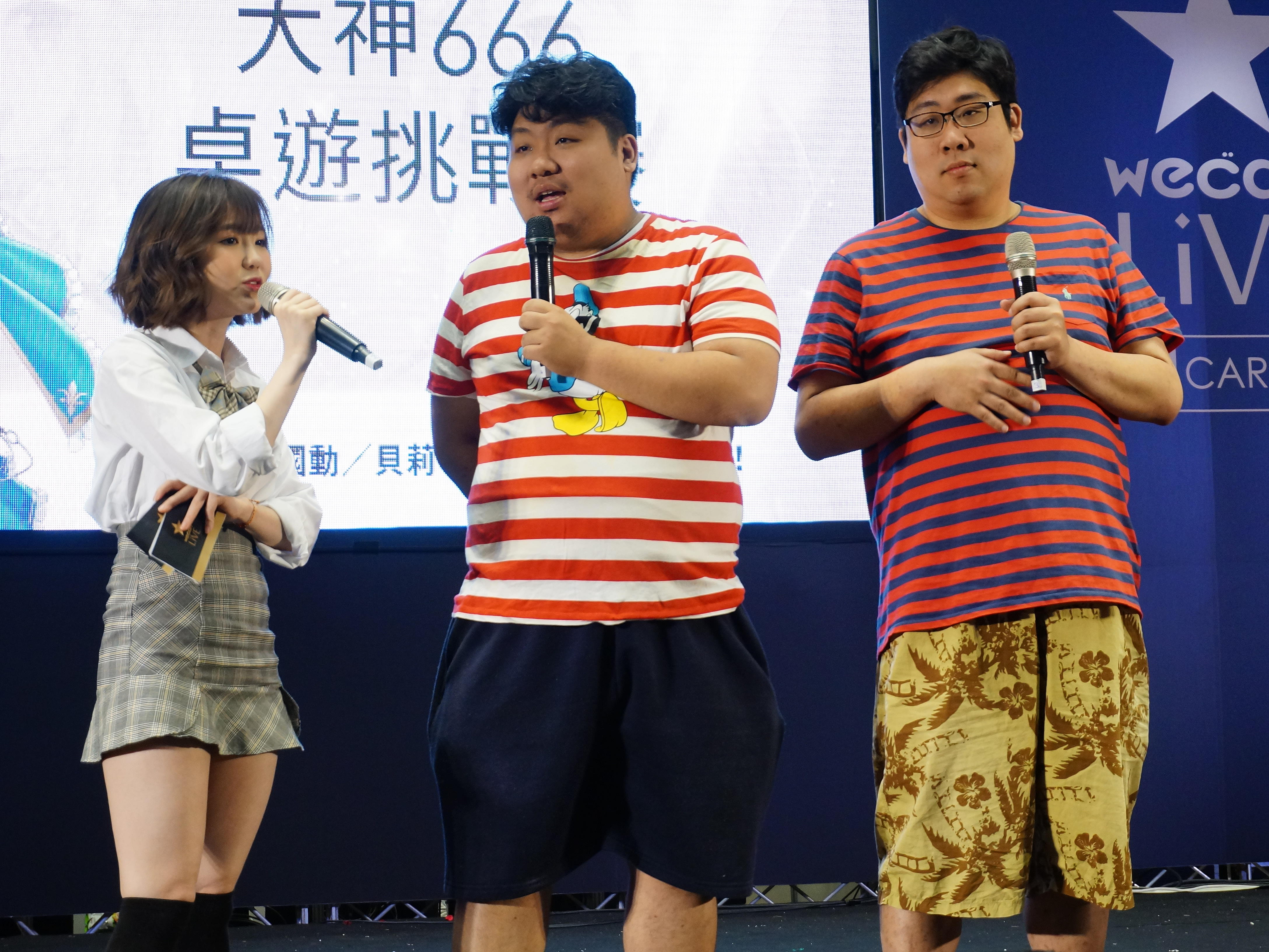 第一屆wecanLive遊戲動漫嘉年華，舞台直播節目《大神666》直播中，女主持人妮妮子（左）、網路遊戲實況主「統神」張嘉航（中）、網路遊戲實況主「國動」張葦航（右）站在舞台上。